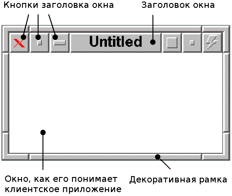 Декоративная рамка и заголовок окна. Эти элементы создаются оконный диспетчером (менеджером) fvwm2. Содержимое окна рисуется клиентом.